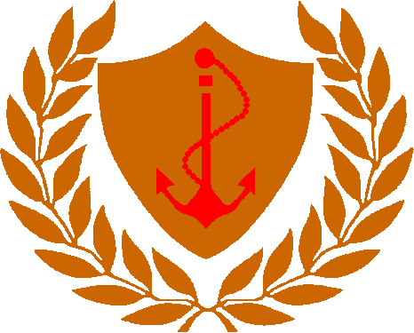 شعار محافظة بور سعيد